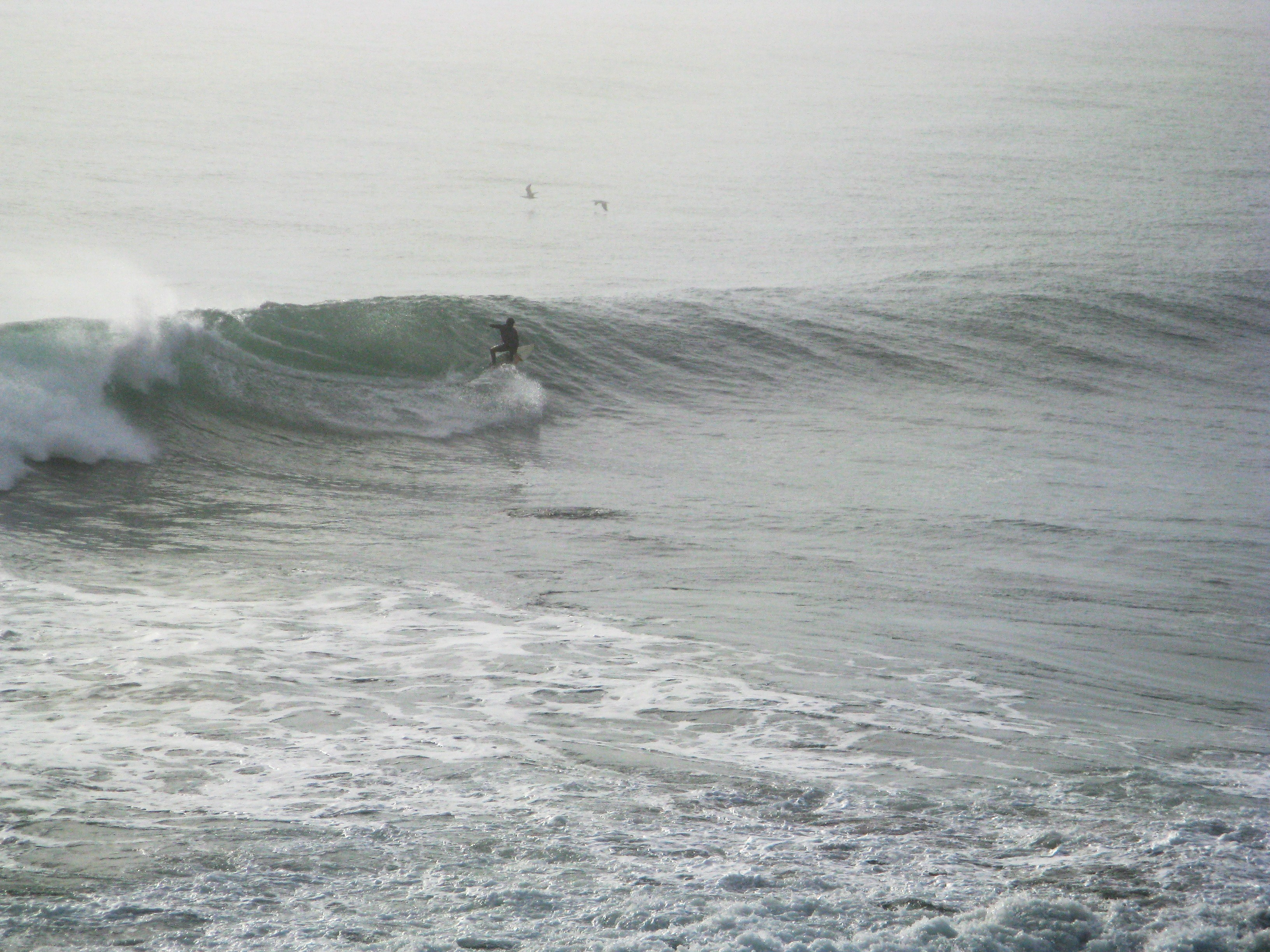 Surfista